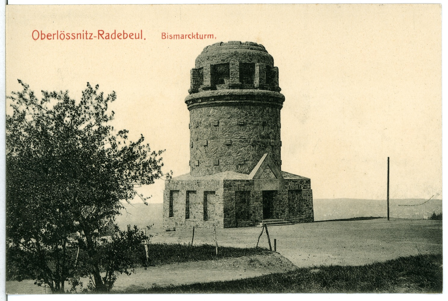 Radebeul; Bismarckturm This postcard is from publisher Brück & Sohn in Meißen ( postcard has a unique number 11182 and is available in a higher resolution at the publisher. This images was uploaded in a cooperation project between Wikipedians and the publisher.